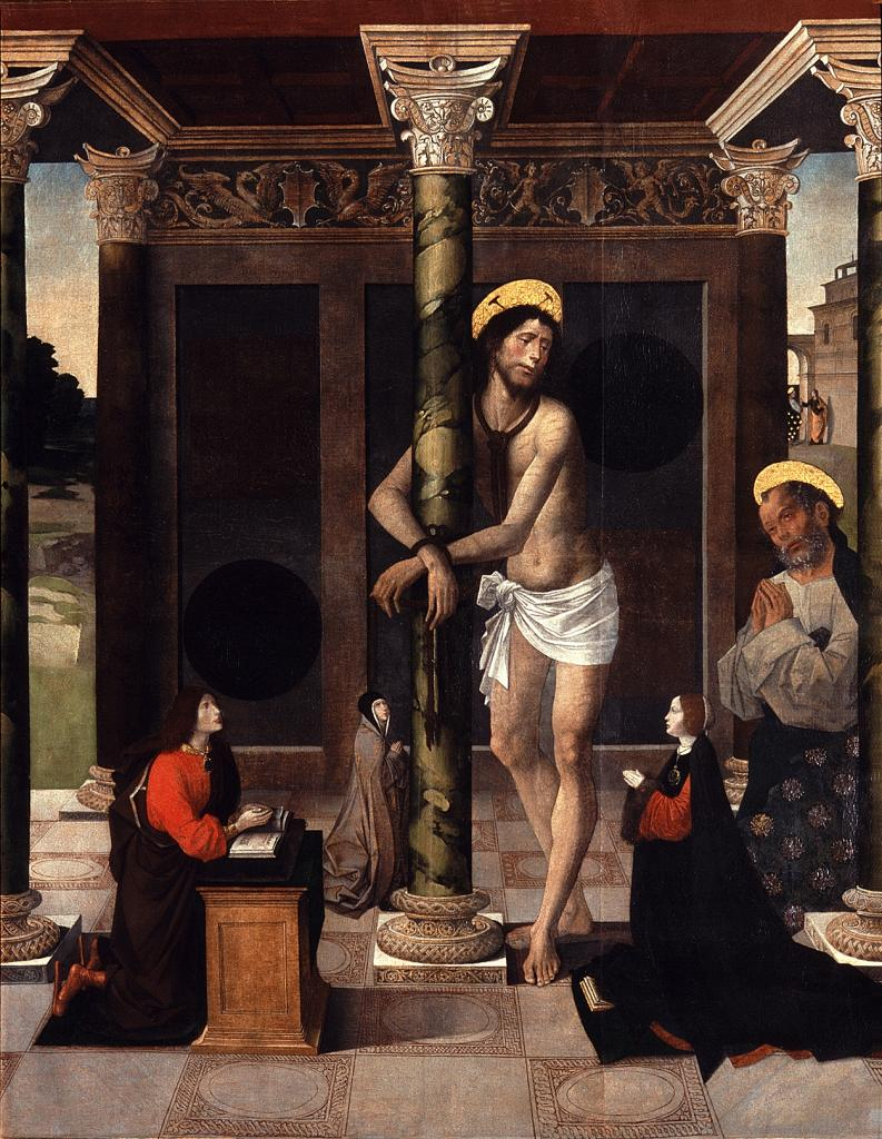 La obra muestra a Jesucristo atado a la columna en la que fue azotado y acompañado por el apóstol San Pedro y por un grupo de donantes arrodillados.